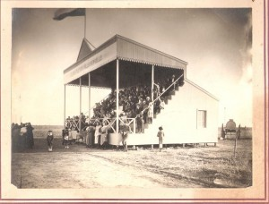 Antigua Tribuna del Club donada x olimpo de Bahia Blanca en 1926